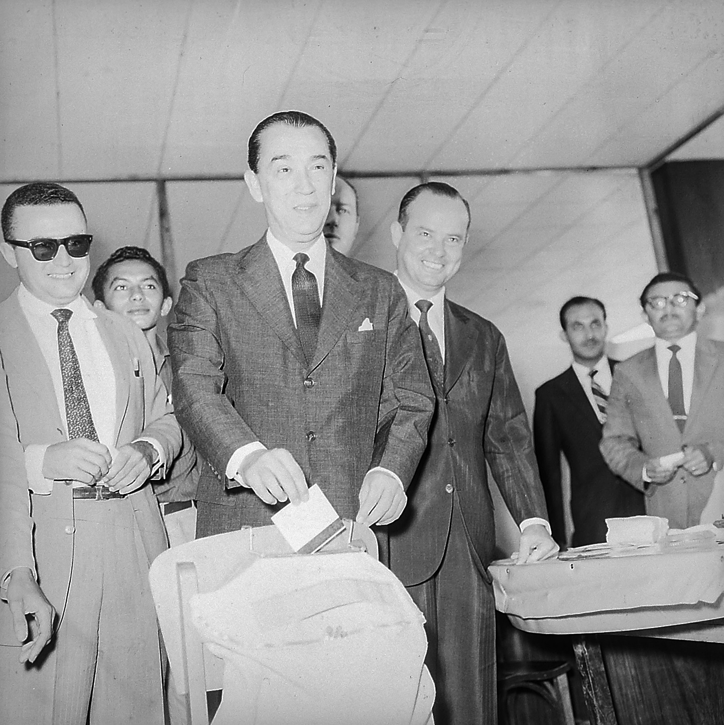 Imagem do Fundo Agência Nacional, do Arquivo Nacional